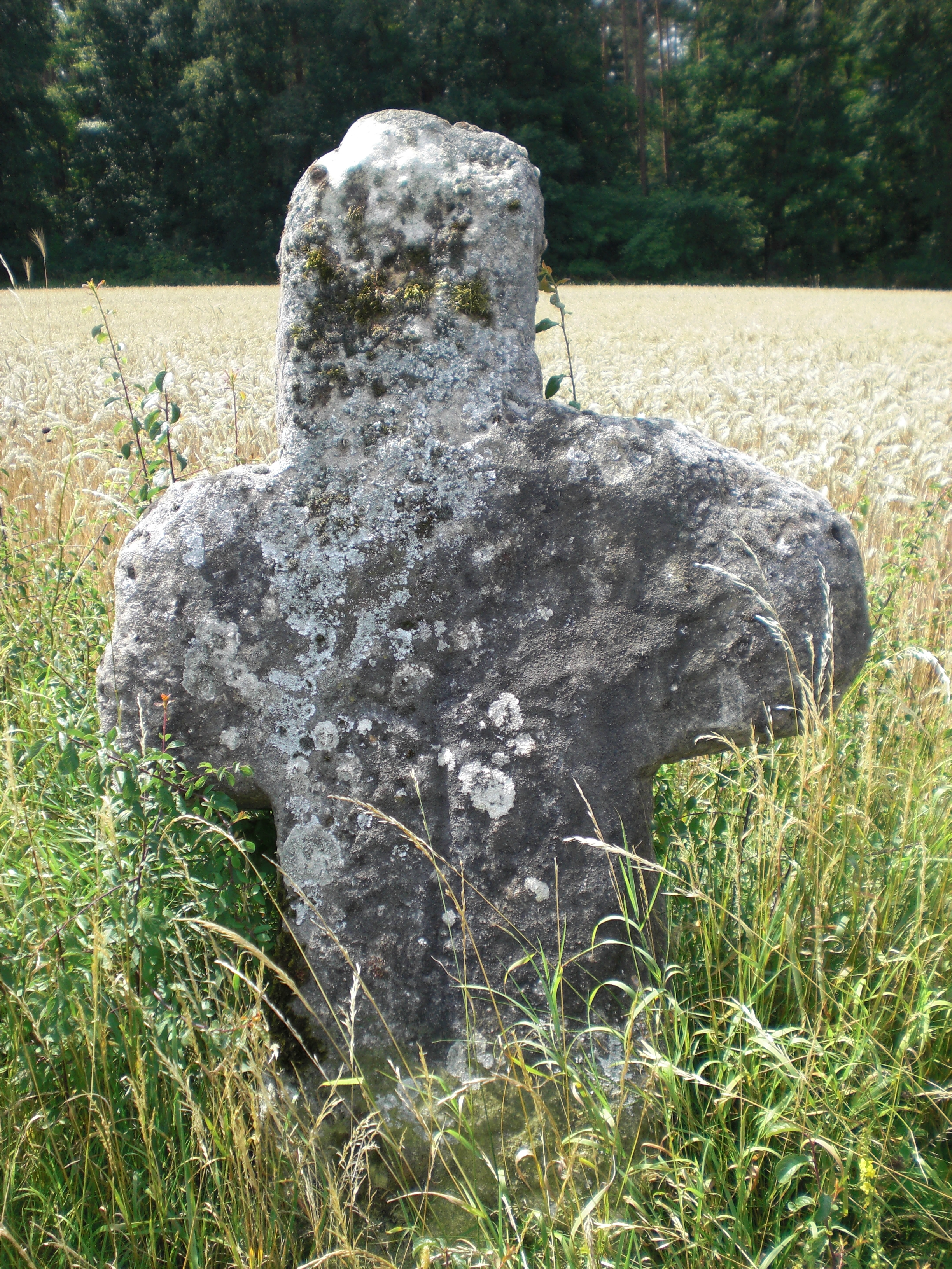 Kreuzstein, sogenanntes Schwedenkreuz, Sandstein, wohl spätmittelalterlich